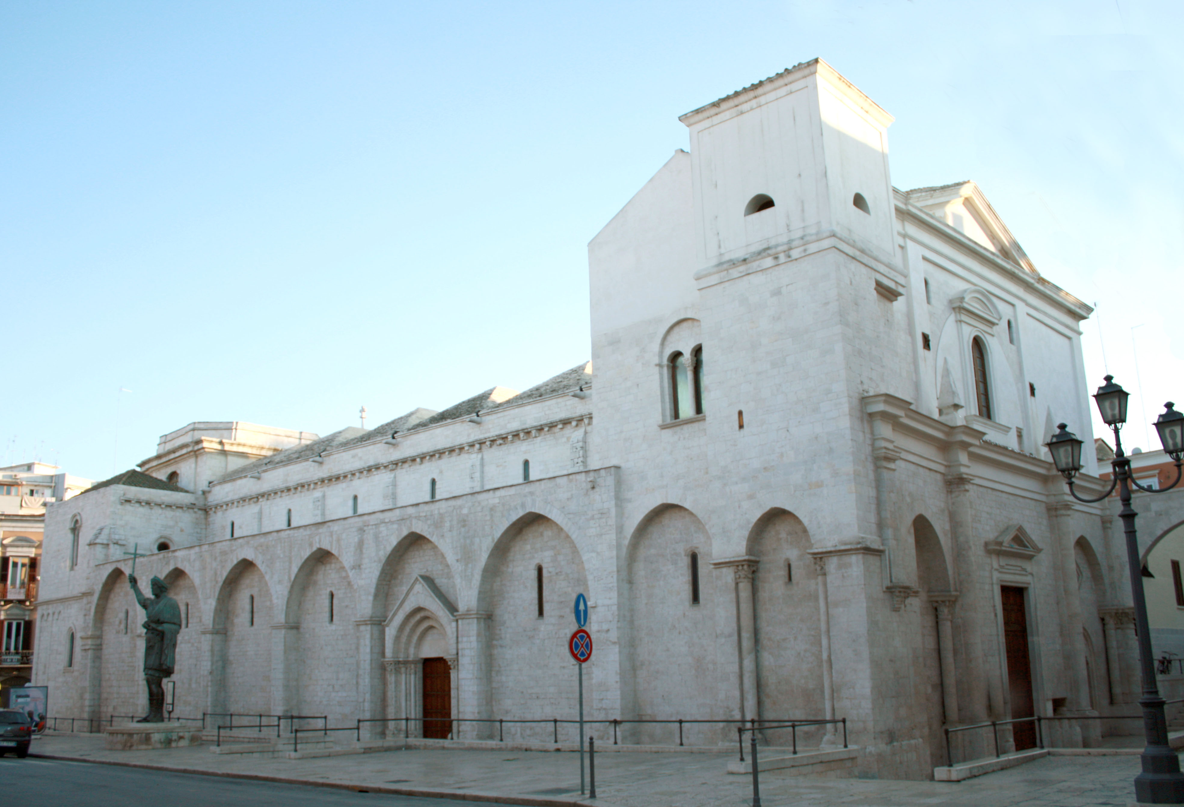 Barletta Basilica del Santo Sepolcro. Prospetto Nord